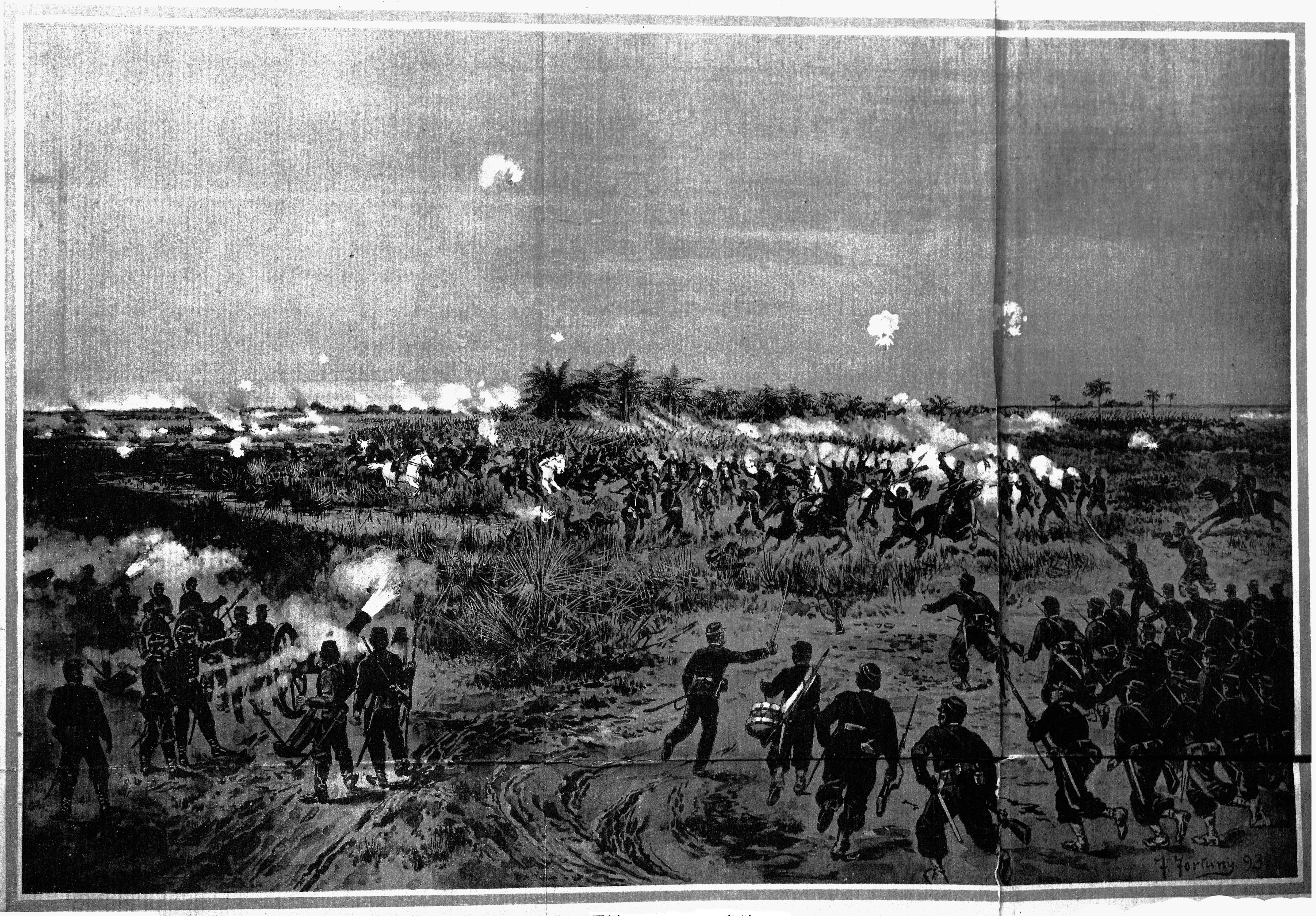 Batalla de Tuyuty: Ganada por El Ejercito Aliado el 24 de mayo de 1866 bajo el comando em jefe del General Don Bartolomé Mitre - Ataque del Ejercito Paraguayo à las lineas Argentinas.